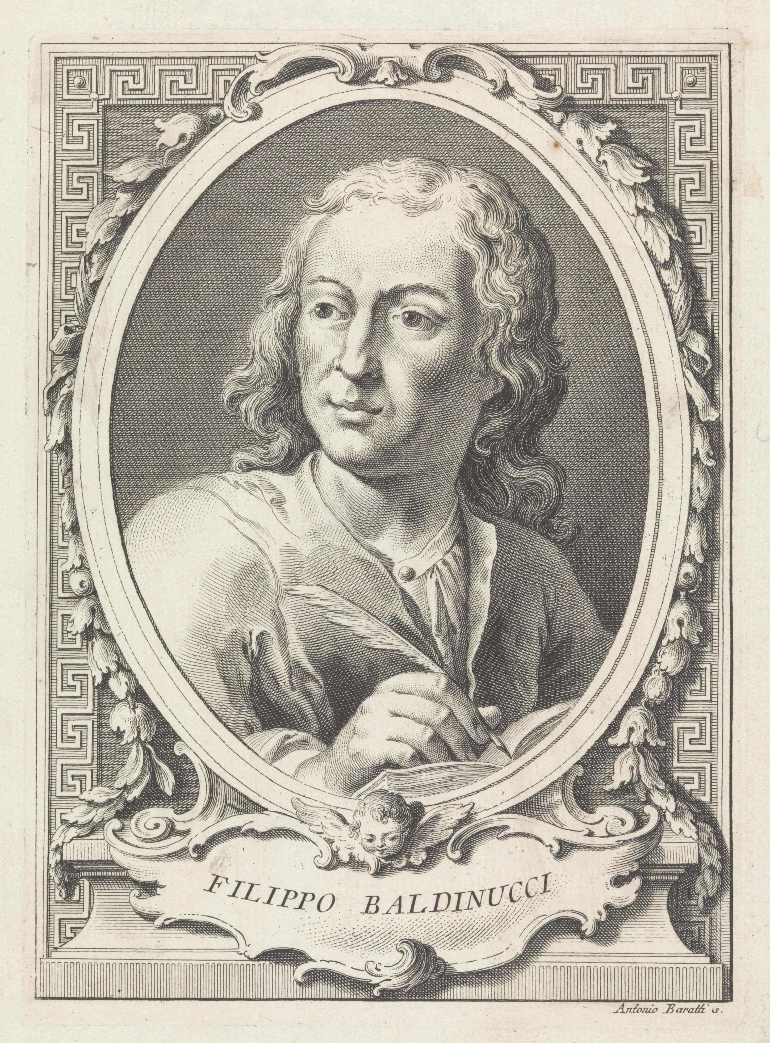 IdentificatieTitel(s): Portret van Filippo BaldinucciObjecttype: prent Objectnummer: RP-P-1907-187Opschriften / Merken: verzamelaarsmerk, verso, gestempeld: Lugt 2228Omschrijving: Portret van kunsthistoricus en schilder Filippo Baldinucci.VervaardigingVervaardiger: prentmaker: Antonio Baratta (vermeld op object)Plaats vervaardiging: ItaliëDatering: 1734 - 1787Fysieke kenmerken: gravureMateriaal: papier Techniek: graveren (drukprocedé)Afmetingen: plaatrand: h 196 mm × b 141 mmOnderwerpWat: historical personsWie: Filippo BaldinucciVerwerving en rechtenVerwerving: aankoop 1905Copyright: Publiek domein